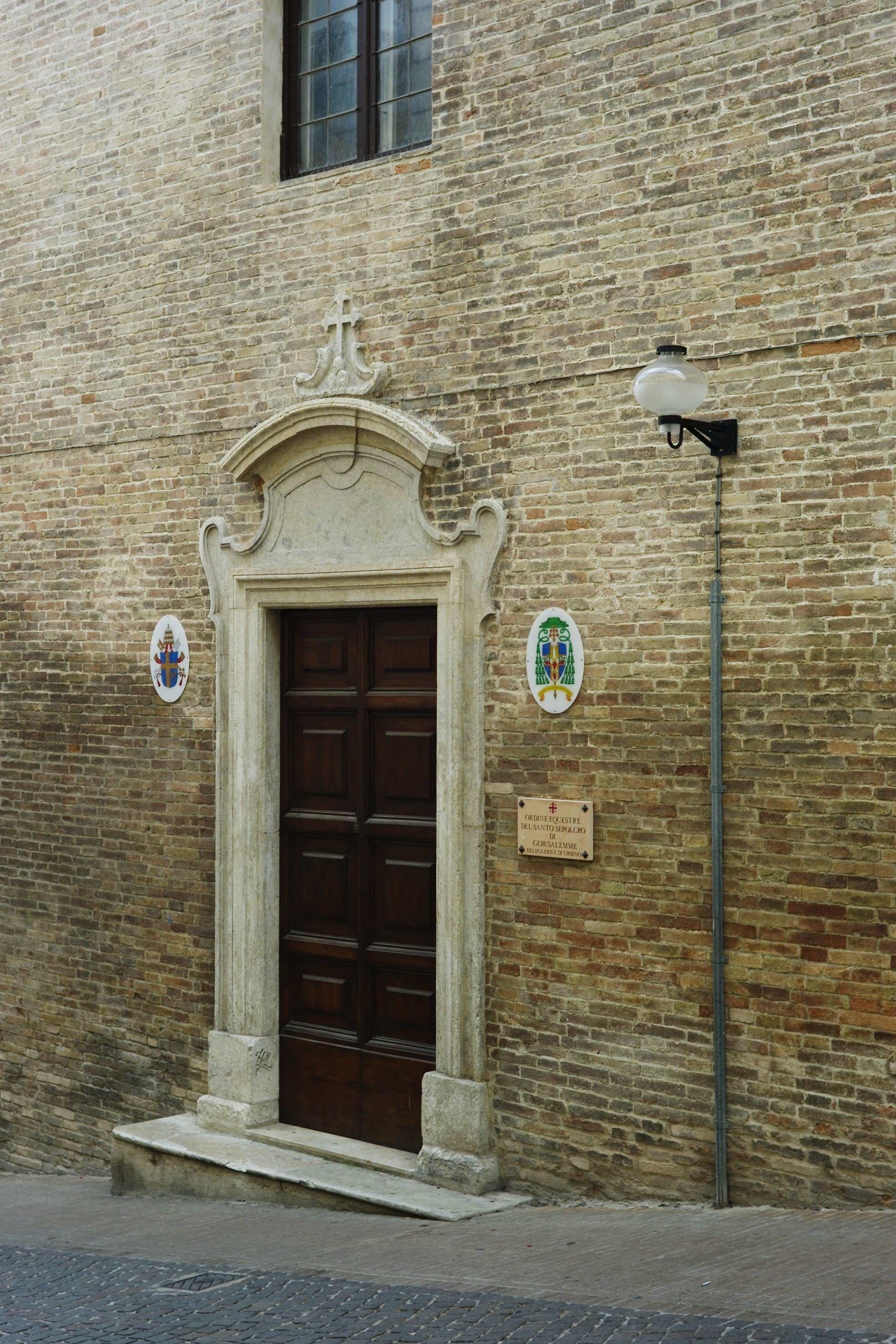 Il portale della chiesa di San Sergio a Urbino, cattedrale cittadina fino al secolo XI.